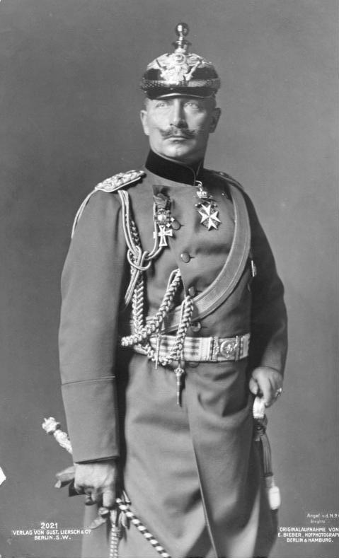 Wilhelm II. Originalaufnahme von E. Bieber, Hofphotograph Berlin und Hamburg. Angef v. d. N.P.G. Steglitz. 2021 Verlag von Gust. Liersch & Co. Berlin S.W.